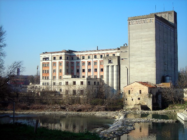 dismissed pasta factory of Pastificio Ponte, Ponte San Giovanni, Perugia, Umbria, Italia